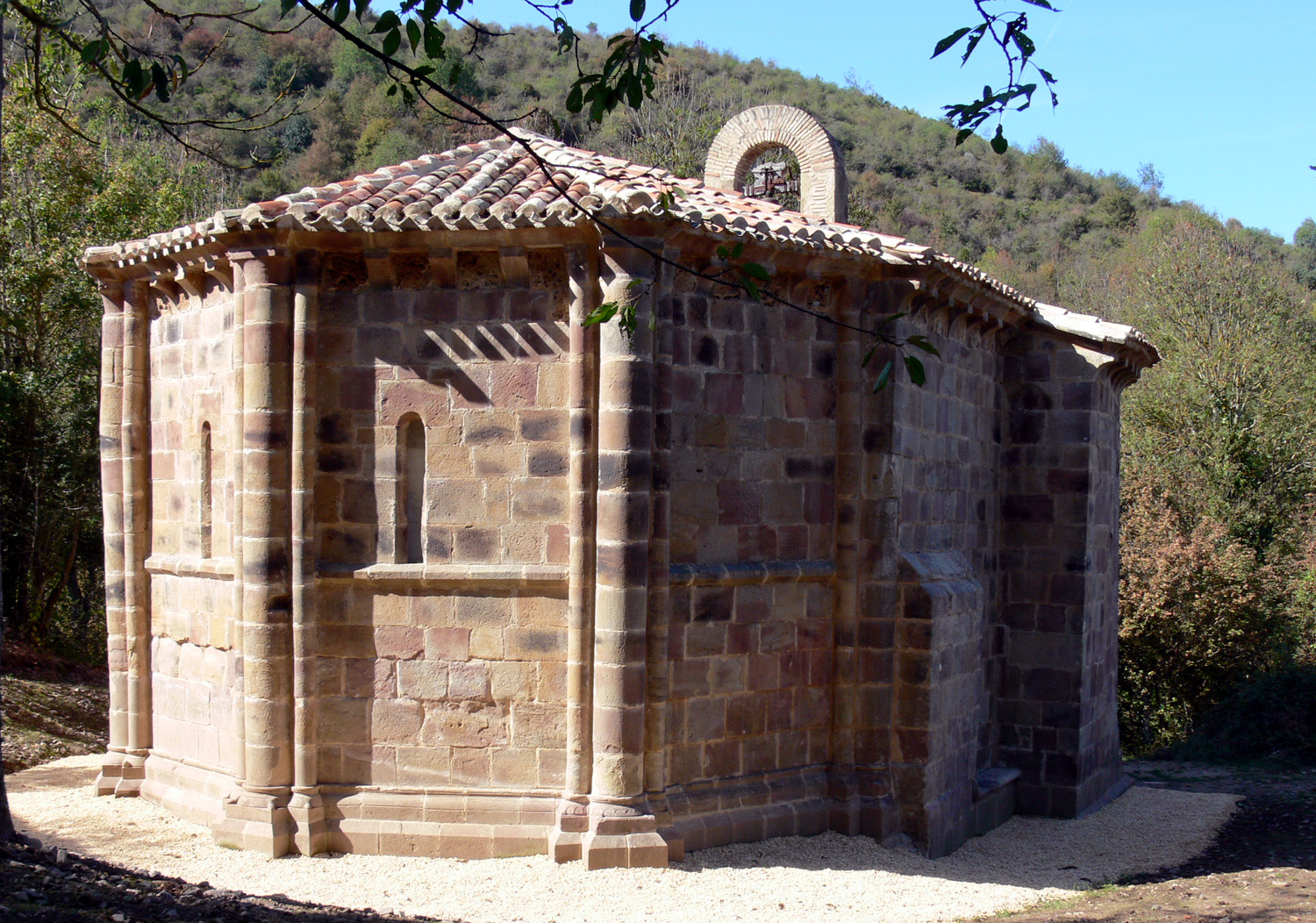 Ermita románica de la Ascensión, en San Asensio de los Cantos, aldea de Ojacastro en La Rioja (España).